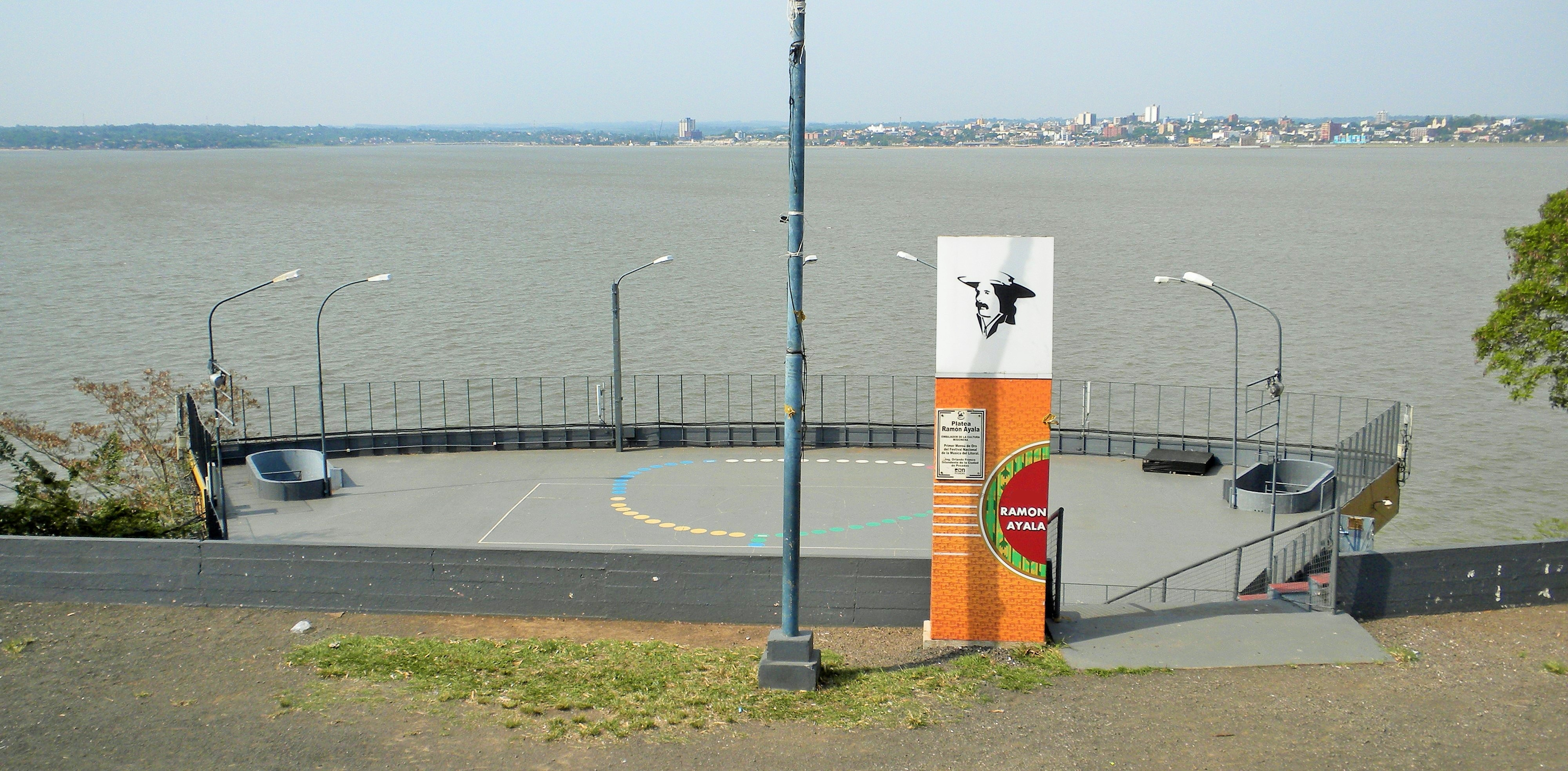 Anfiteatro "Manuel Antonio Ramírez" de Posadas, Provincia de Misiones, Argentina. Fuenteː Periodista Horacio Cambeiro.